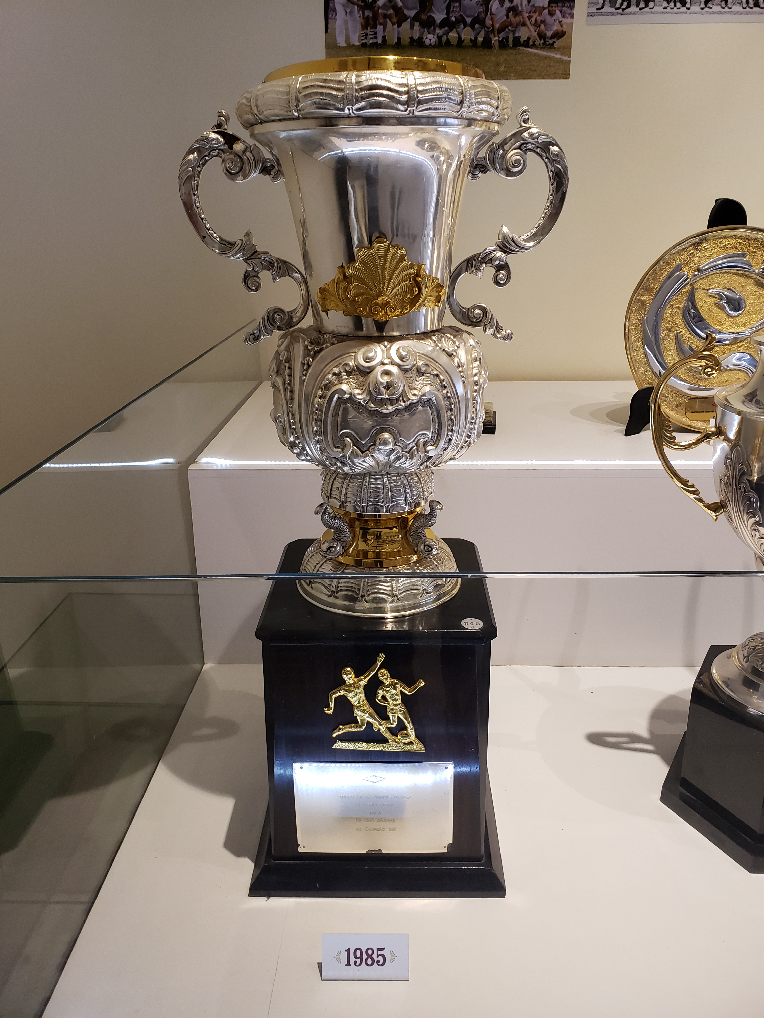 Taça do Campeonato Carioca de Futebol de 1985, conquistado pelo Fluminense Football Club, chegando então ao tricampeonato estadual.